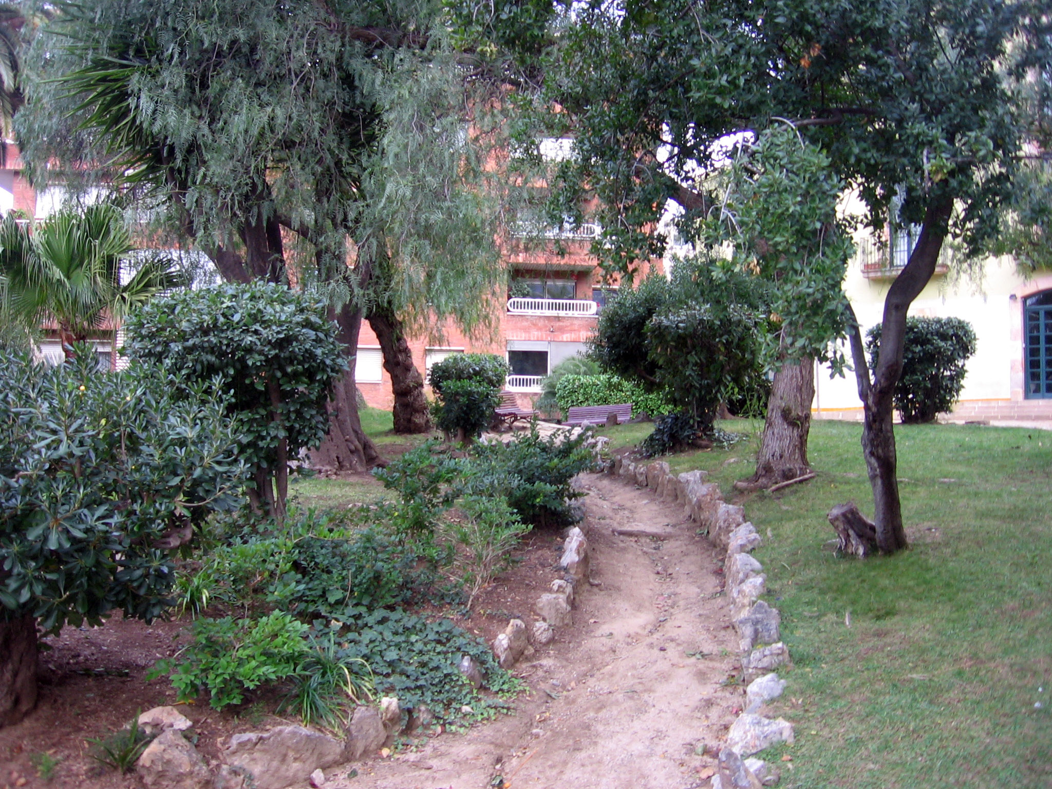 Jardines de Can Castelló.